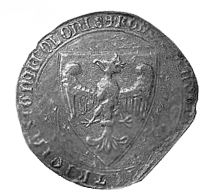 Przemysł II seal